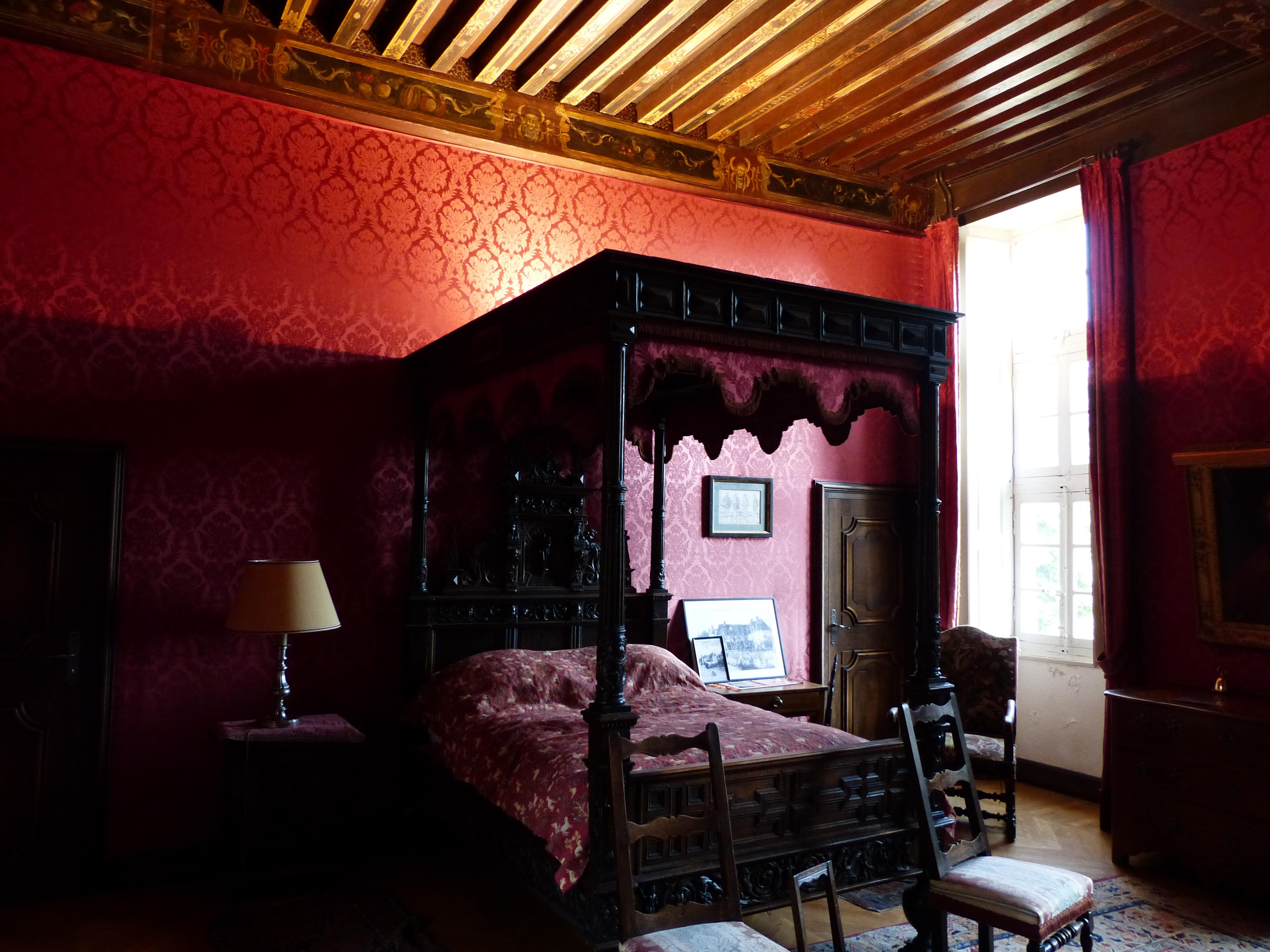 Château de Denone, Effiat (Puy-de-Dôme) en 2014. Chambre dite de Richelieu. Le lit à baldaquin est daté de 1632.